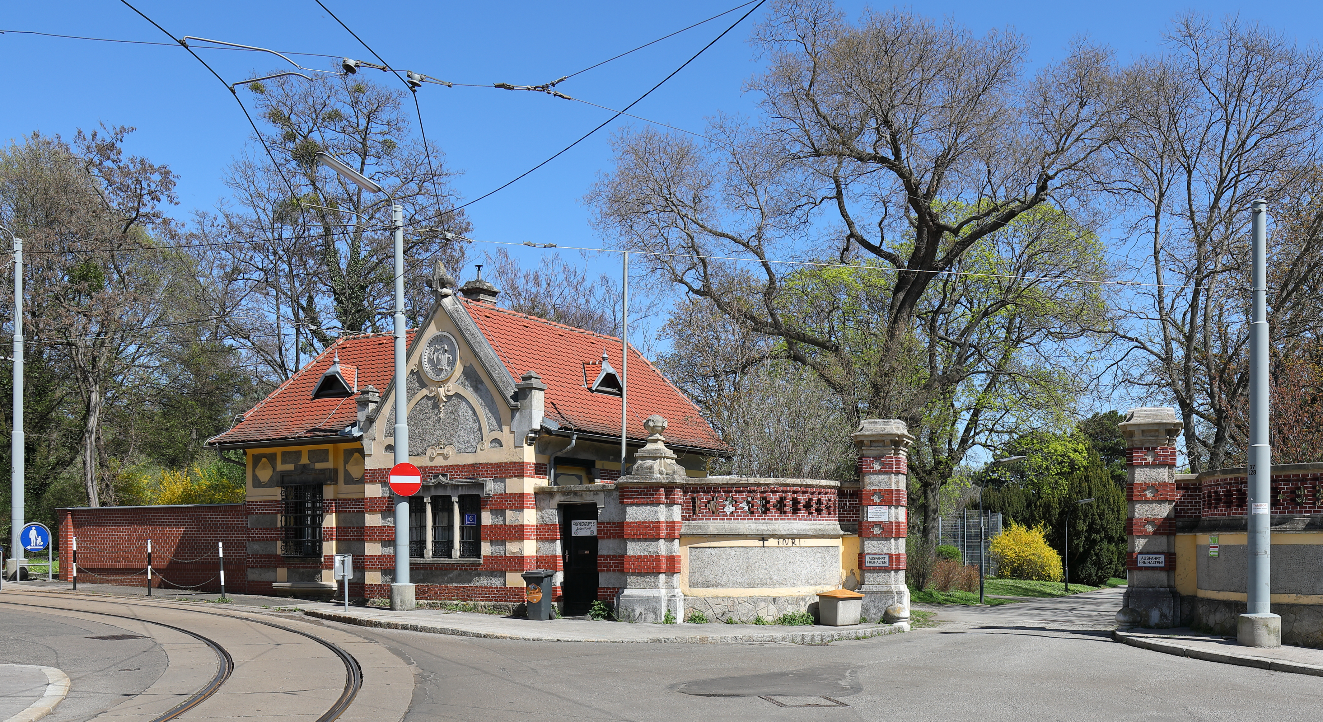 Das Pförtnerhaus der ehemaligen Rothschild-Gärten an der Südwestecke des Heiligenstädter Parks im 19. Wiener Gemeindebezirk Döbling. Das eingeschoßige Gebäude in historistischer Formensprache steht unter Denkmalschutz und wurde als Pförtnerhaus errichtet als Nathaniel Meyer Freiherr von Rothschild in den 1860er Jahren die über 80.000 m² großen Rothschild-Gärten anlegen ließ. 1938 wurden sie arisiert und 1942 kaufte die Stadt Wien sie vom Deutschen Reich. 1949 verzichtete die erbliche Witwe darauf, trotzdem wurden sie 1962 rückgefordert. Am 30. Juli 1963 verzichtete die Sammelstelle A gegen eine Entschädigungssumme von 18 Millionen Schilling auf alle Rechte und Ansprüche bezüglich der Gartenanlage. 1977 wurde der Heiligenstädter Park um den nördliche Teil der ehemaligen Rothschild-Gärten erweitert.